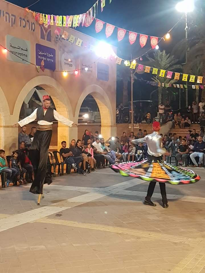 חגיגות פסטיבל לילות רמדאן בעיר